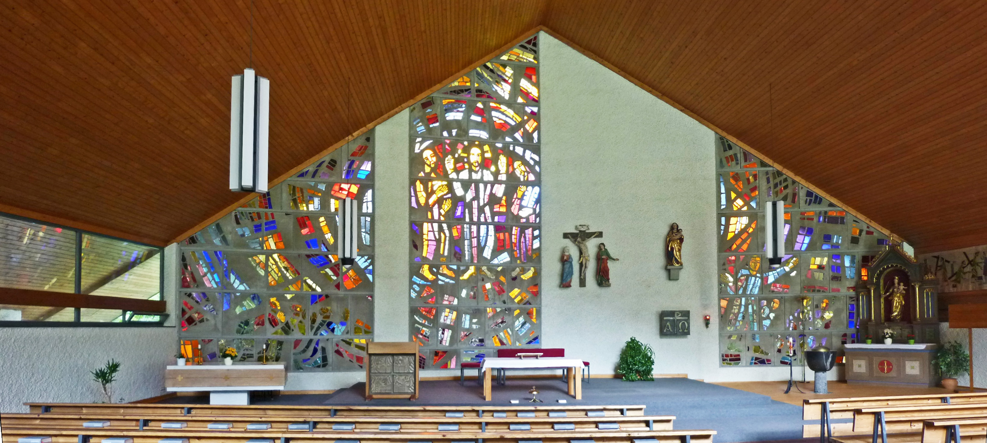 Innenraum der Filialkirche Verklärung Jesu in Latschau (OT von Tschagguns) im Montafon